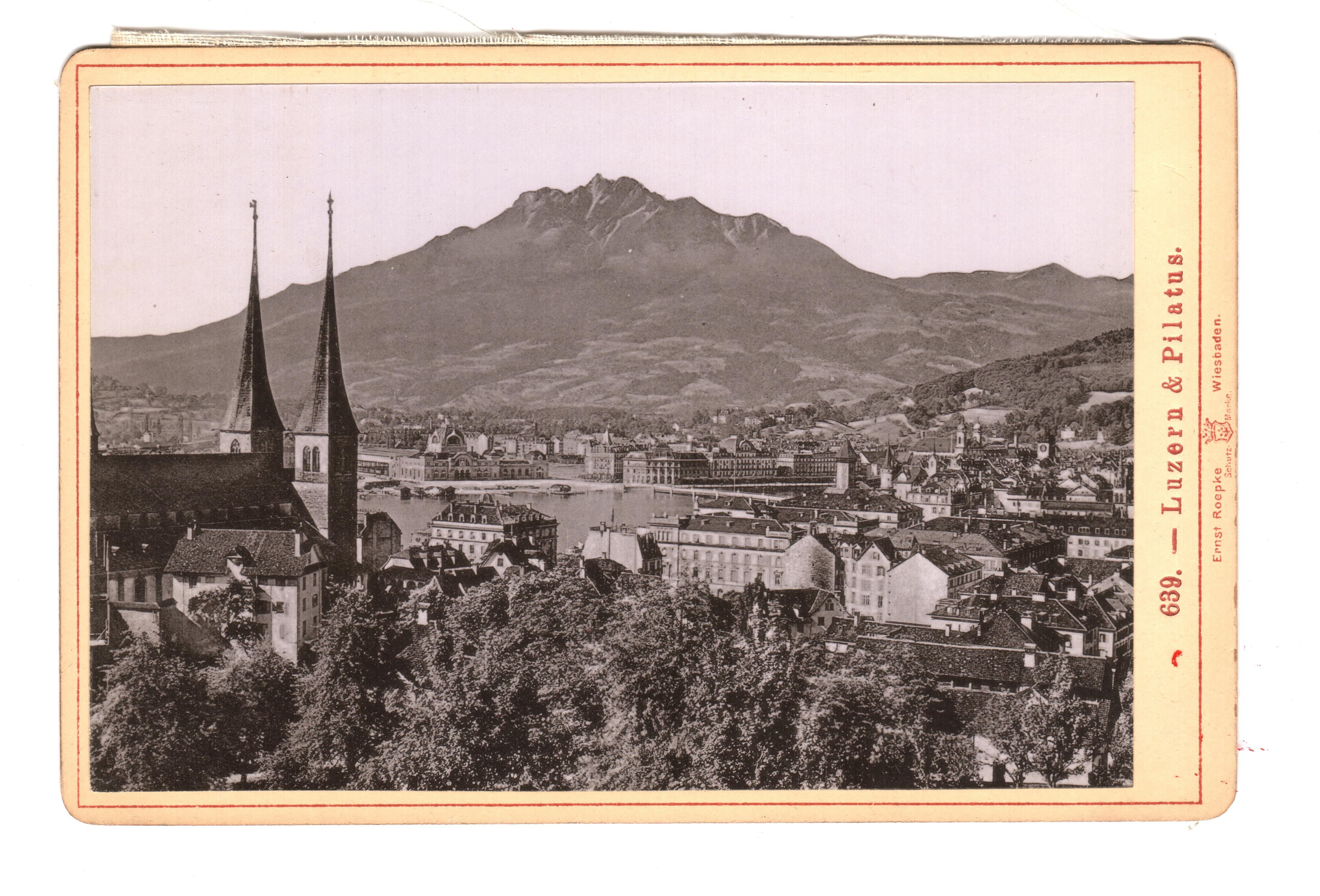 Osztrák-Magyar Monarchia, Luzern. Ernst Roepke fényképész, Wiesbaden. A Luzern című fényképalbum 12, fehér kartonsorozatra ragasztott, fehér vászonnal összefűzött fényképéből. ©© Megjelent Creative Commons alatt a Metapolisz sorozatban. A Metapolisz sorozat valamennyi képe és filmje Creative Commons alatti valamint kereskedelmi - for profit - célra is felhasználható. Ajánlott hivatkozás: Derzsi Elekes Andor: Metapolisz DVD line ©© Published under Creative Commons in the Metapolisz DVD line. All of the photos and vids in the Metapolisz DVD line are under Creative Commons and can be used even for commercial – for profit – purposes. Recommended Citation Derzsi Elekes Andor: Metapolisz DVD line